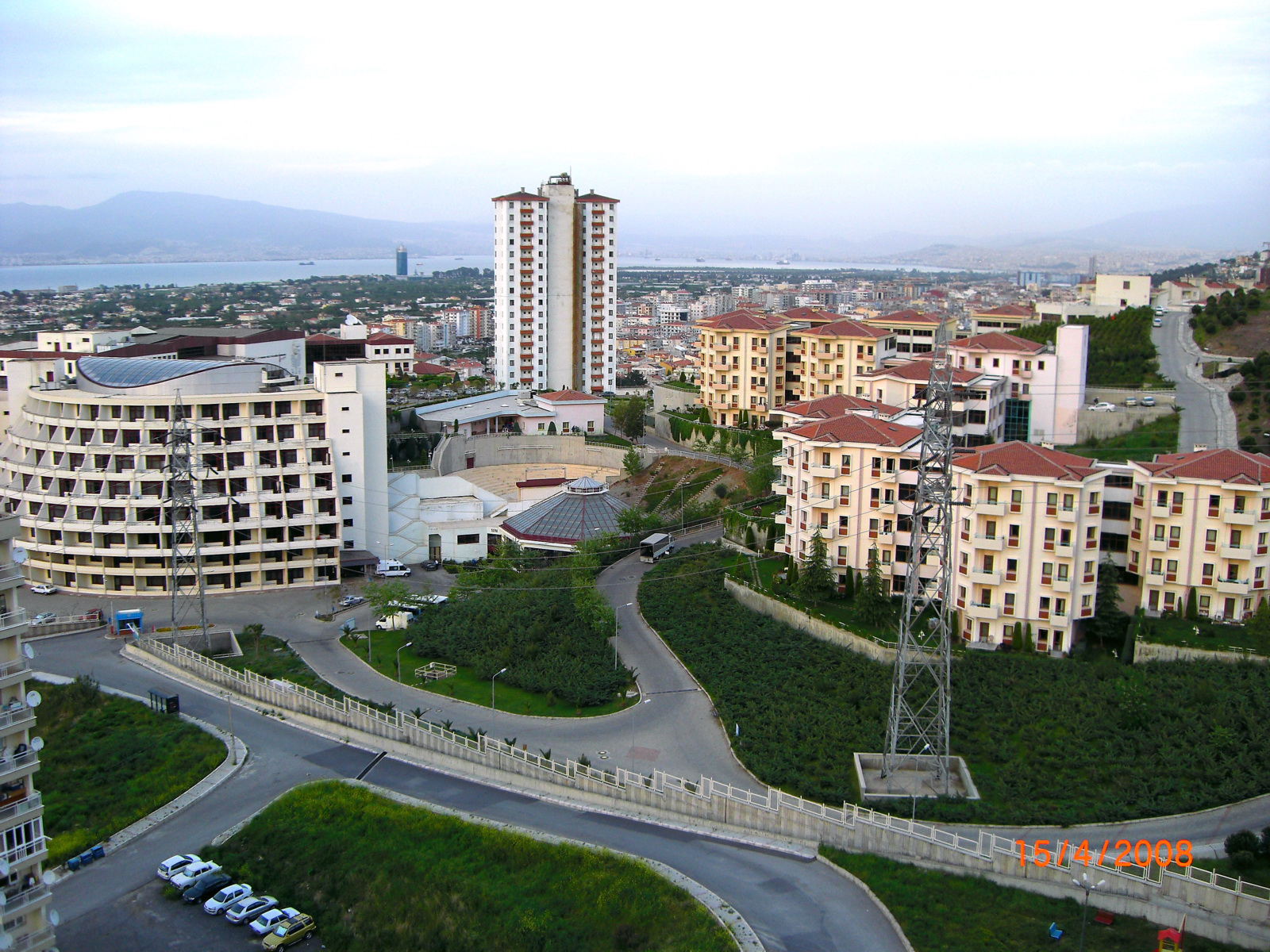 Narlidere Huzur Evi